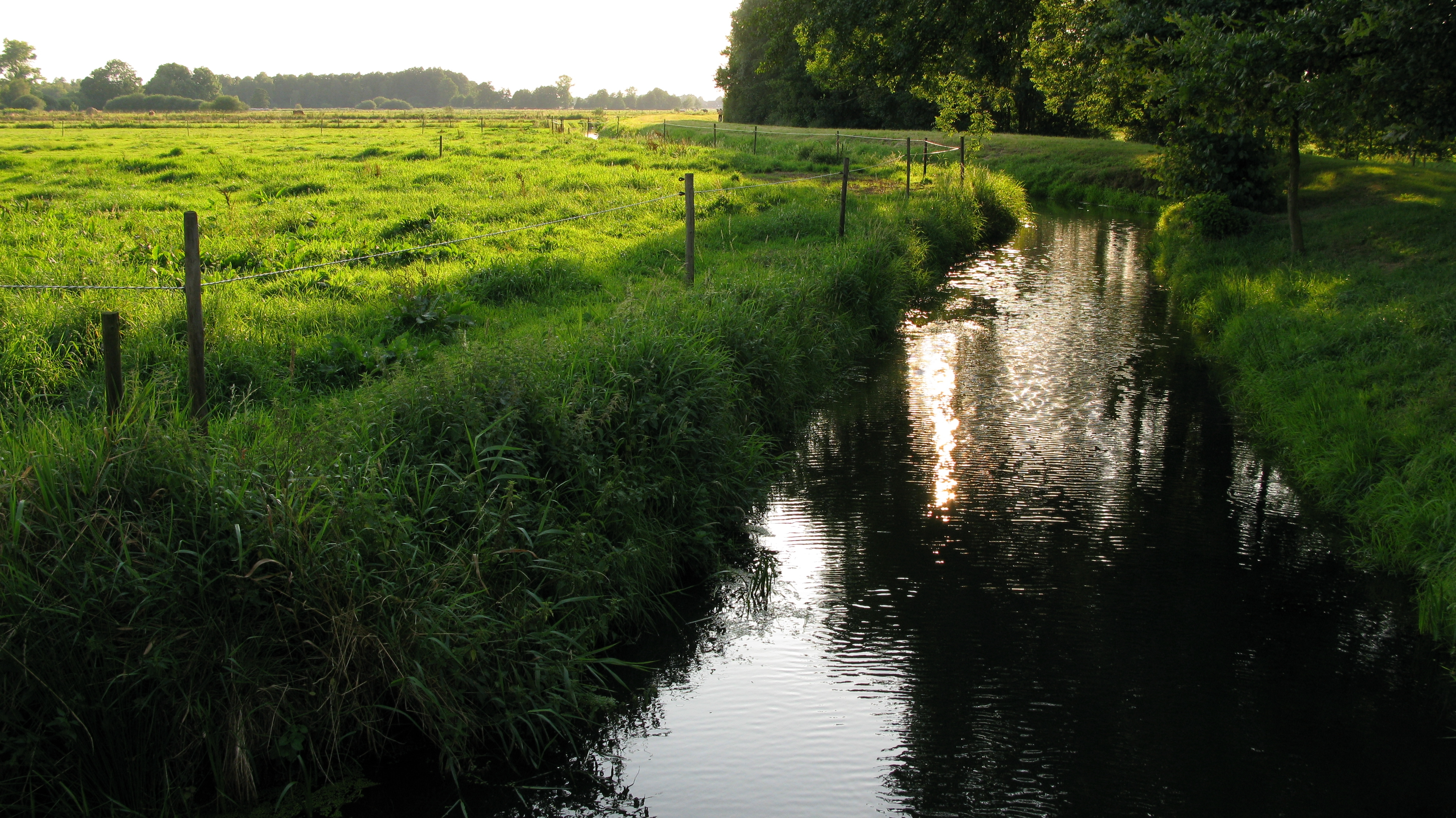 Moorgürtel